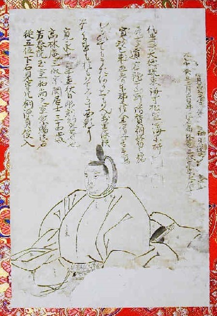 片桐貞昌の肖像。